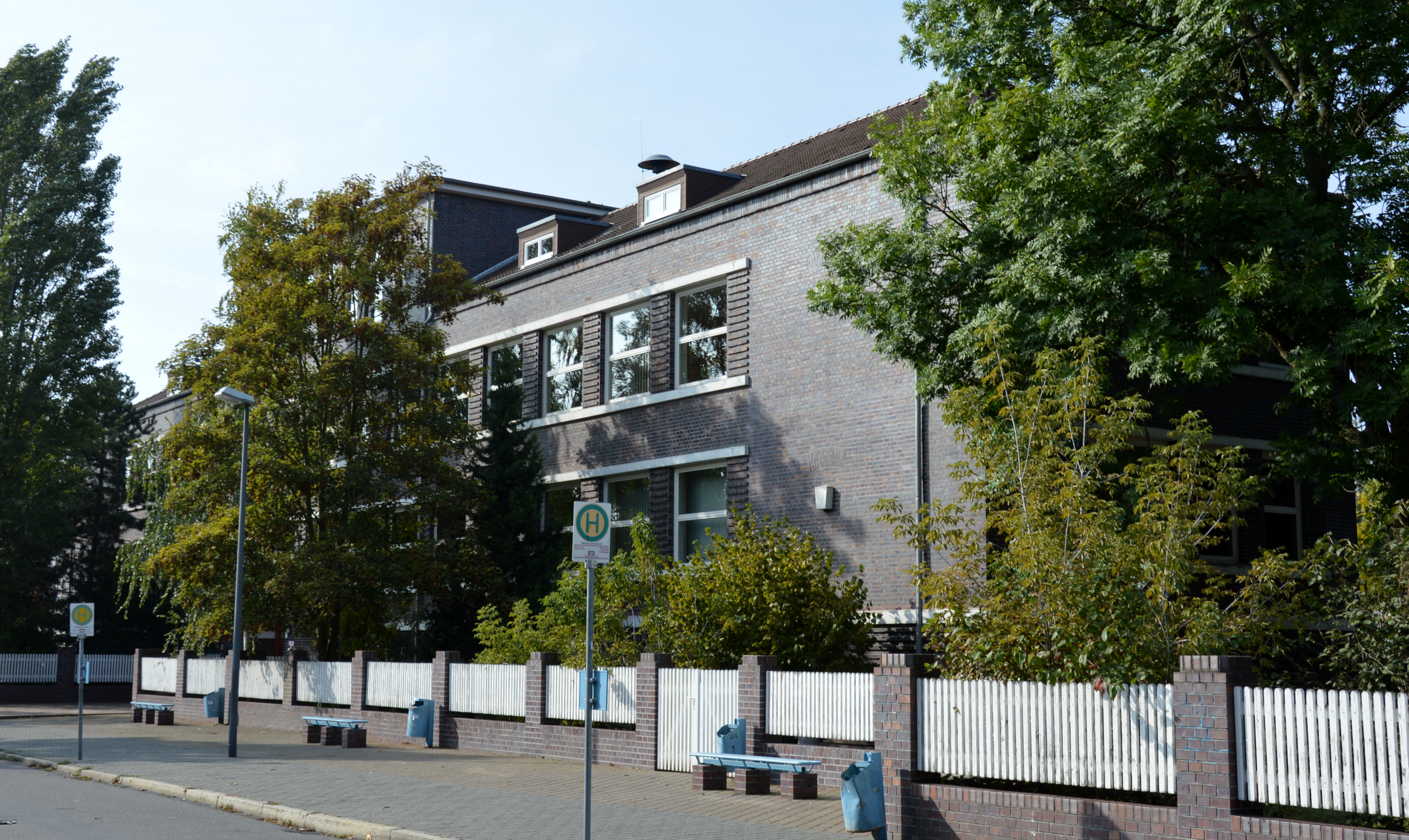 Haus Binnengärtenstraße 17 in Bitterfeld